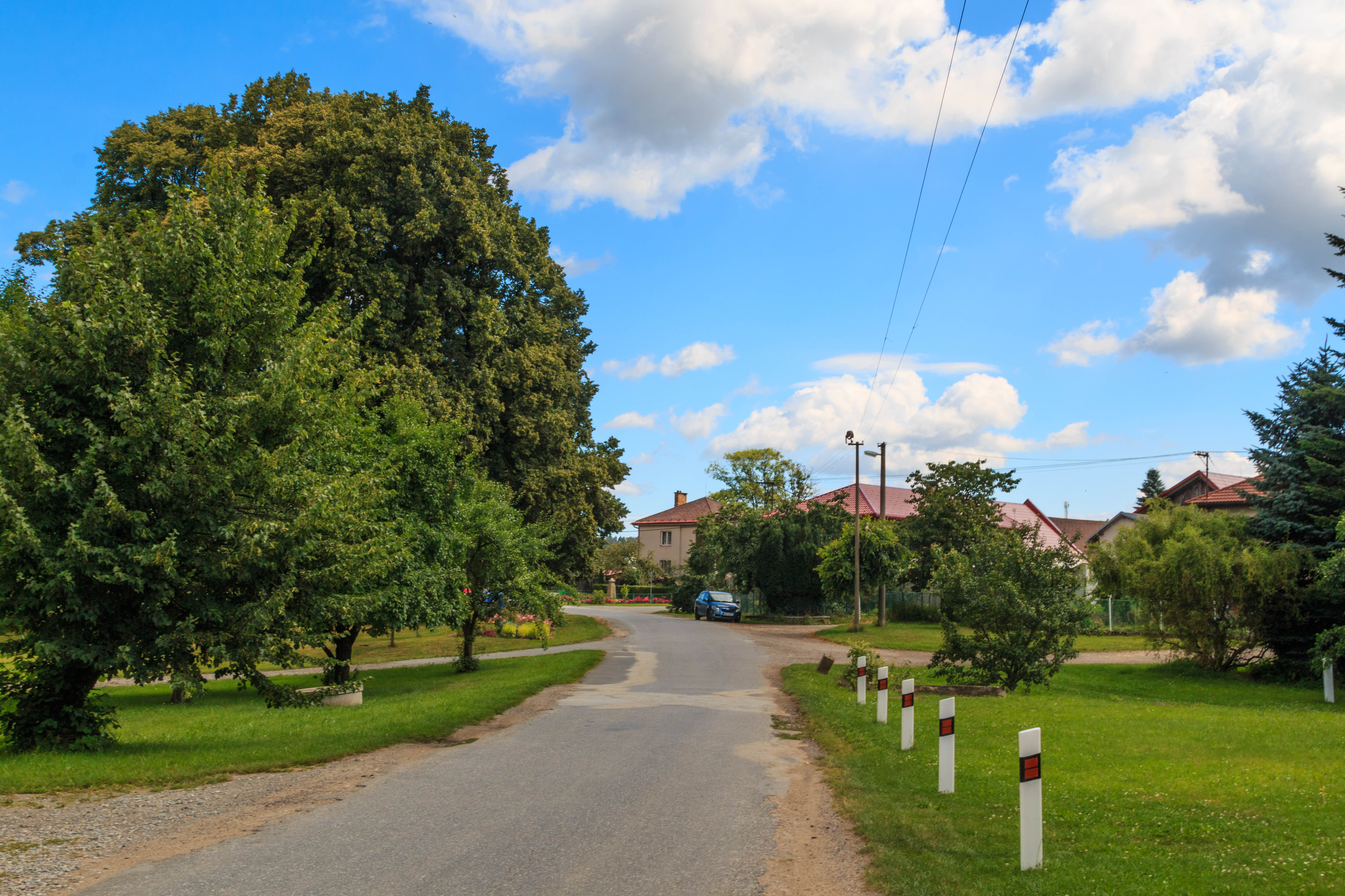 Radostín u Havlíčkova Brodu - náves